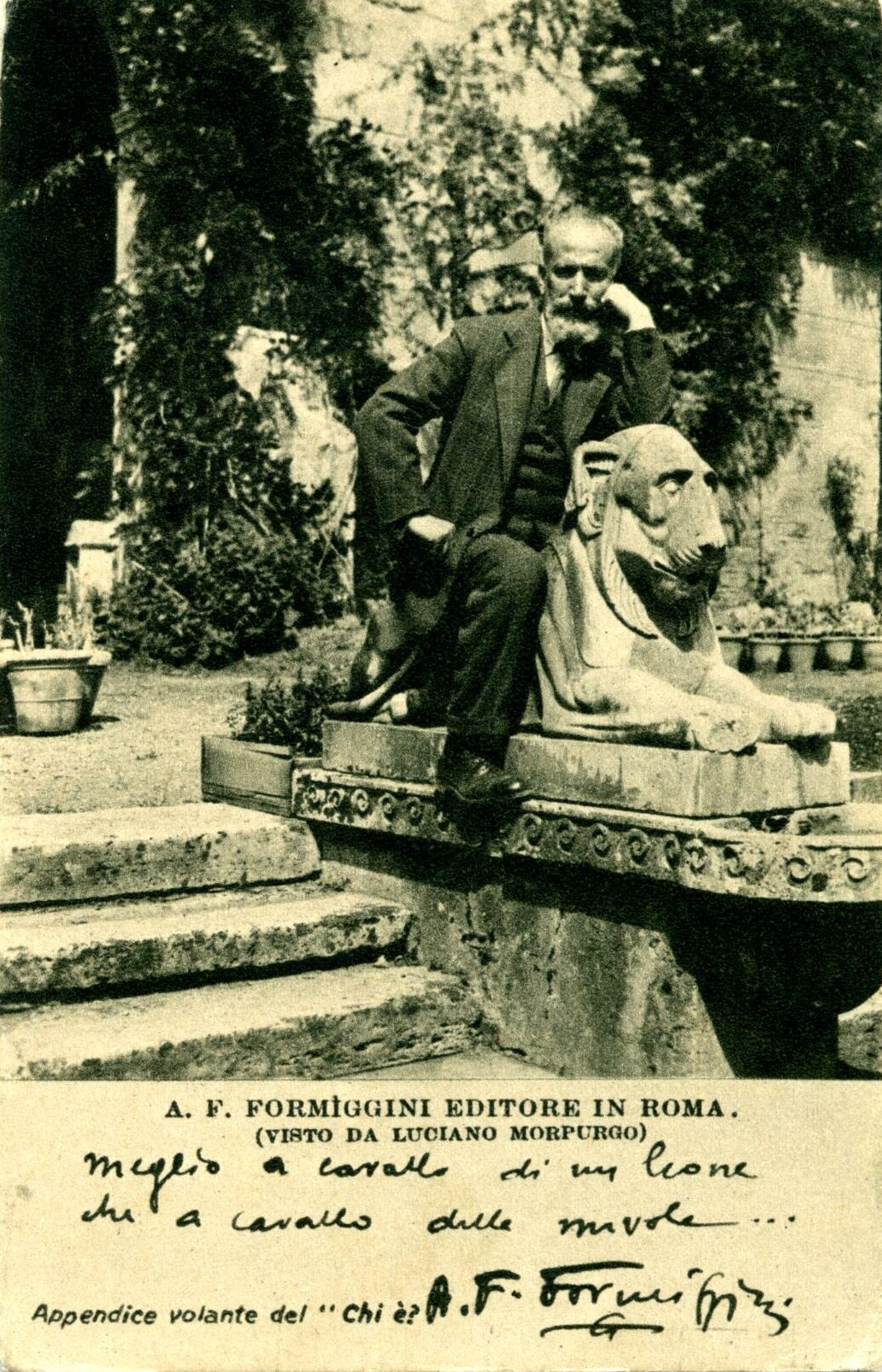 Angelo Fortunato Formiggini de la Goliardia et la Corda Fratres, éditeur italien. Il a écrit en italien : "Il est mieux d'être assis sur un lion qu'être assis sur un nuage"